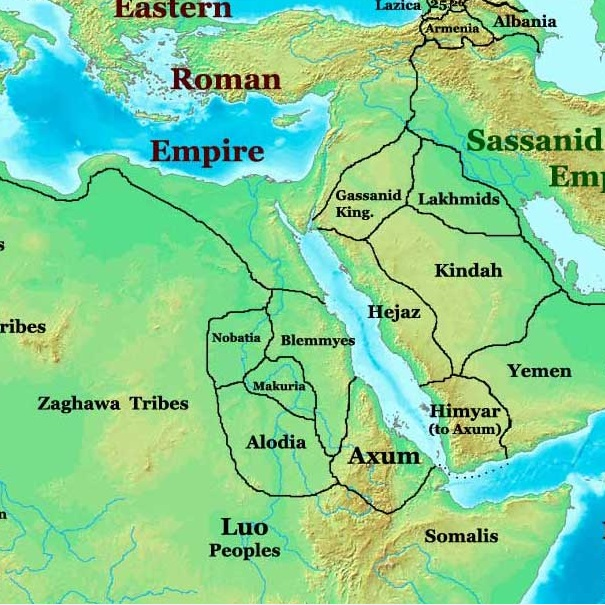 Mapa Localizando o território dos Blêmios